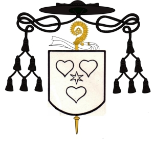 Wappen Wolfgang Zobell, 1523 - 1563, Abt von Münsterschwarzach (1556-1563)